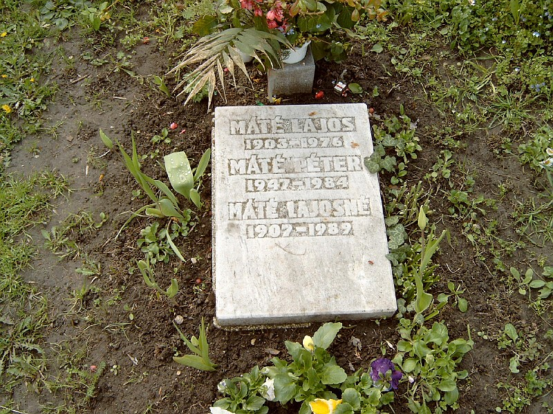 Máté Péter sírja Budapesten. Farkasréti temető: 60/5-6-23.